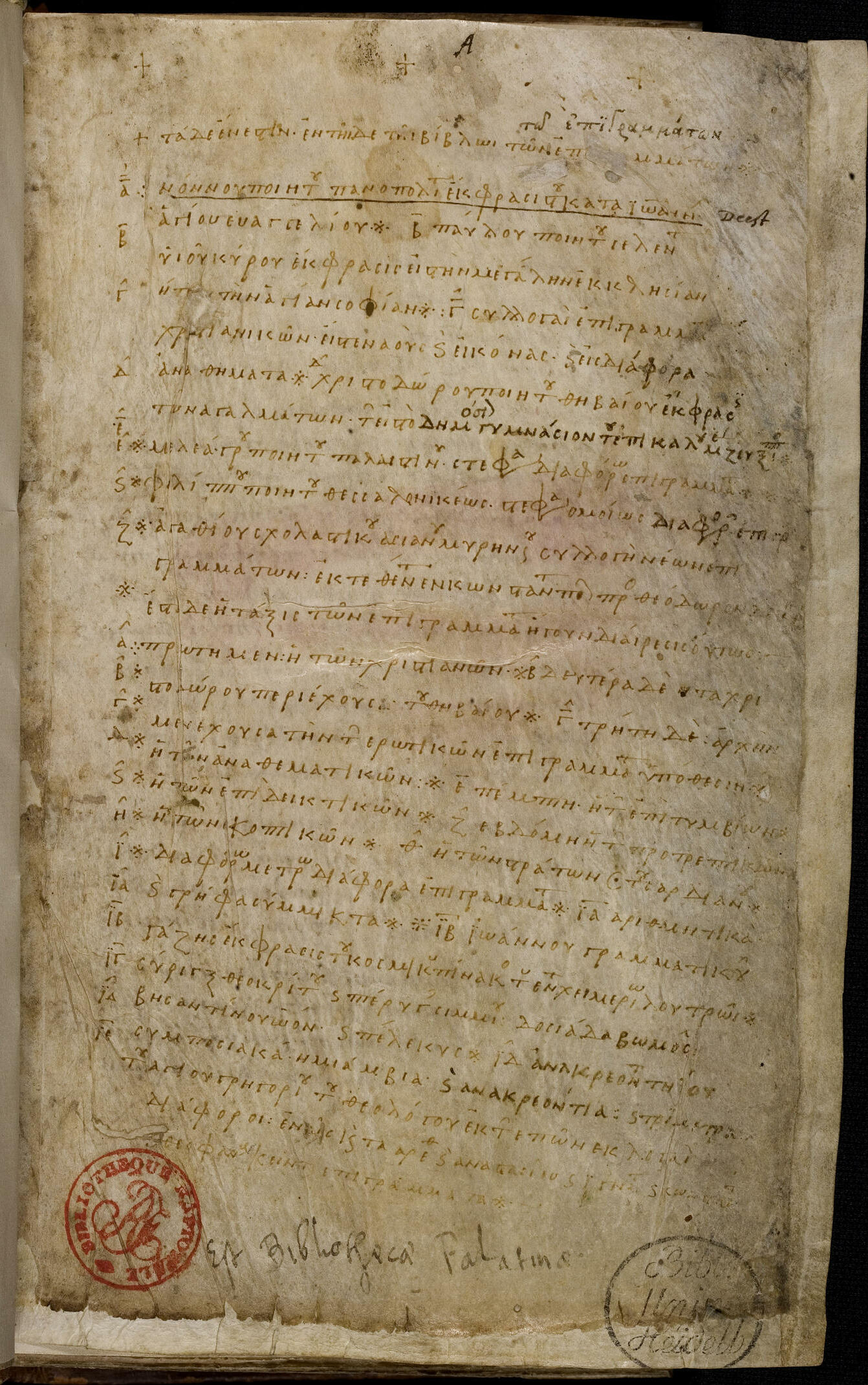 Byzantinische Handschrift aus der 2. Hälfte des 9. und 1. Hälfte des 10. Jahrhunderts, bezeichnet als Codex Palatinus graecus 23 aus der Universitätsbibliothek Heidelberg. Inhalt ist die Anthologia Graeca, hier folium 5 recto. Digitalisat gefördert durch die Gesellschaft der Freunde Universität Heidelberg e. V.